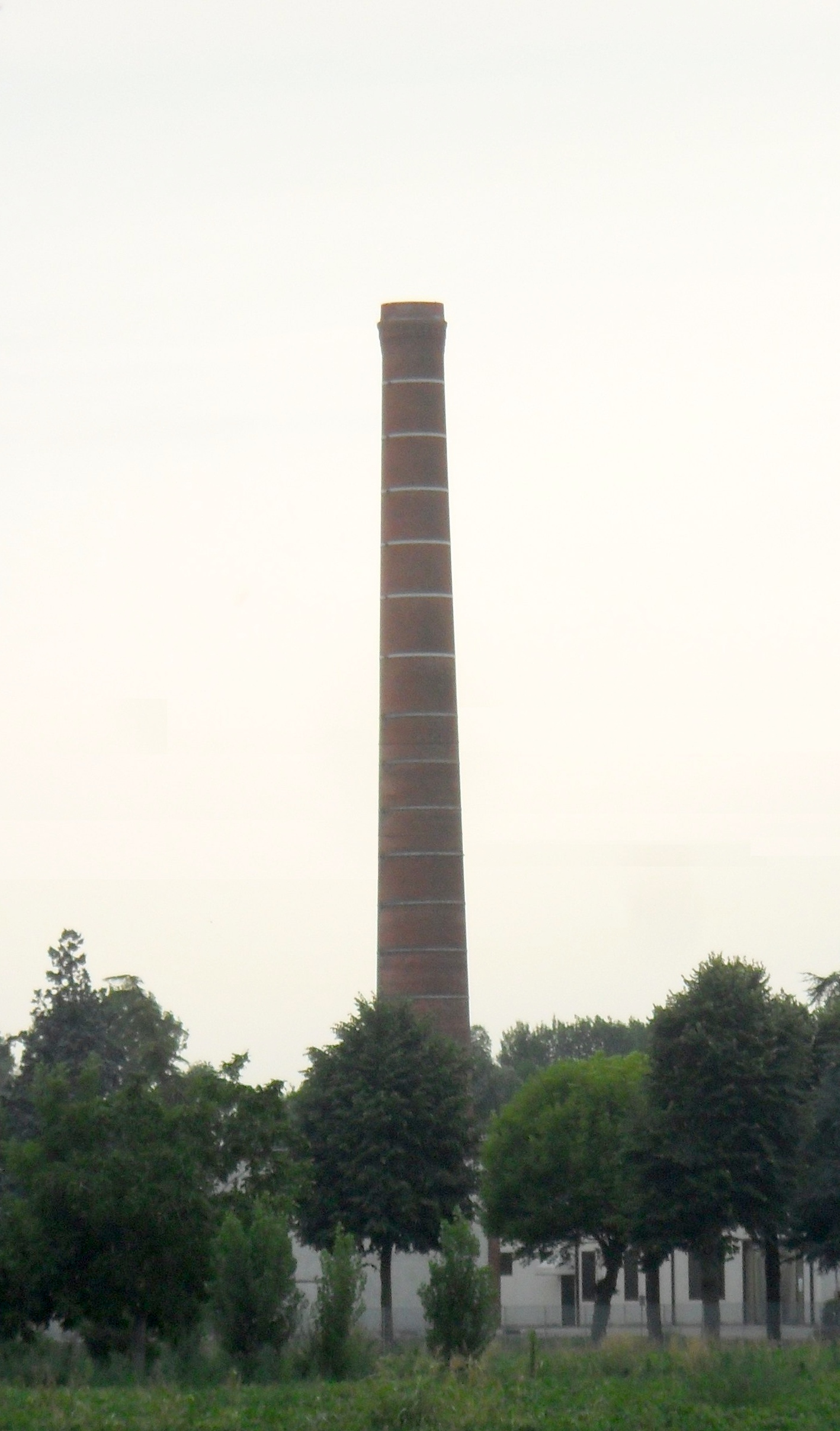 Parte dello zuccherificio ora dismesso visibile a grande distanza.